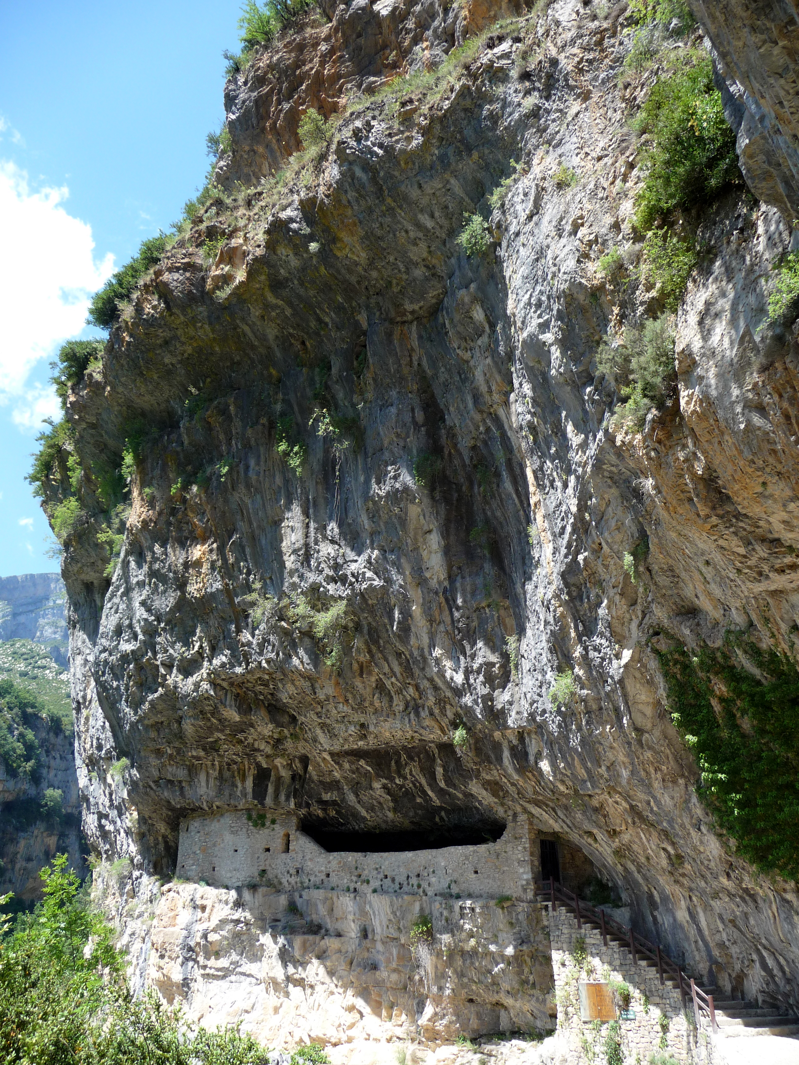 Ermita romànica de Sant Urbez (Sant Urbici) al Sobrarb.